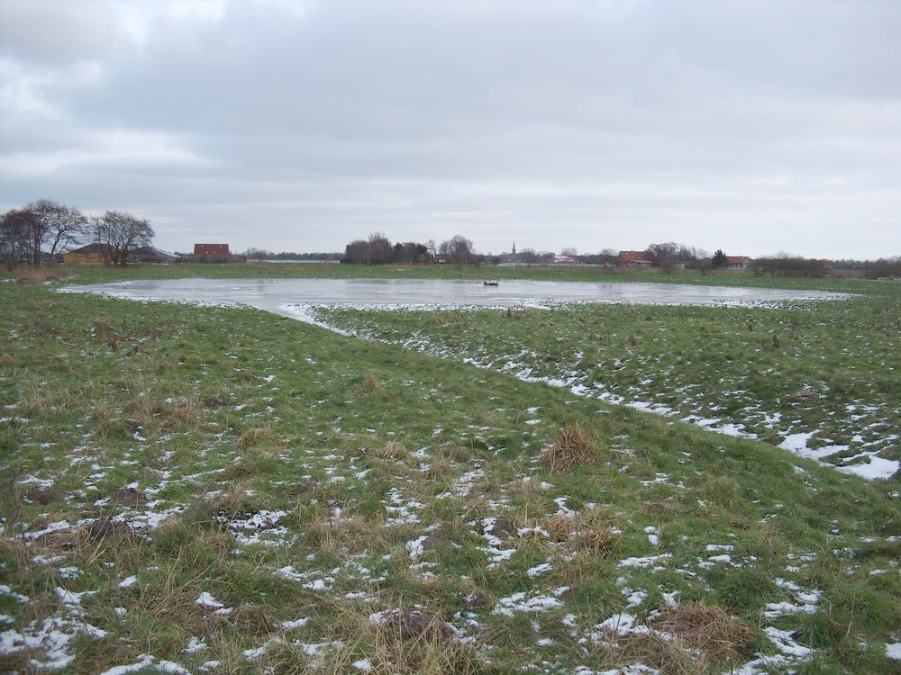 Aufnahme einer Pingo-Ruine westlich von Esens